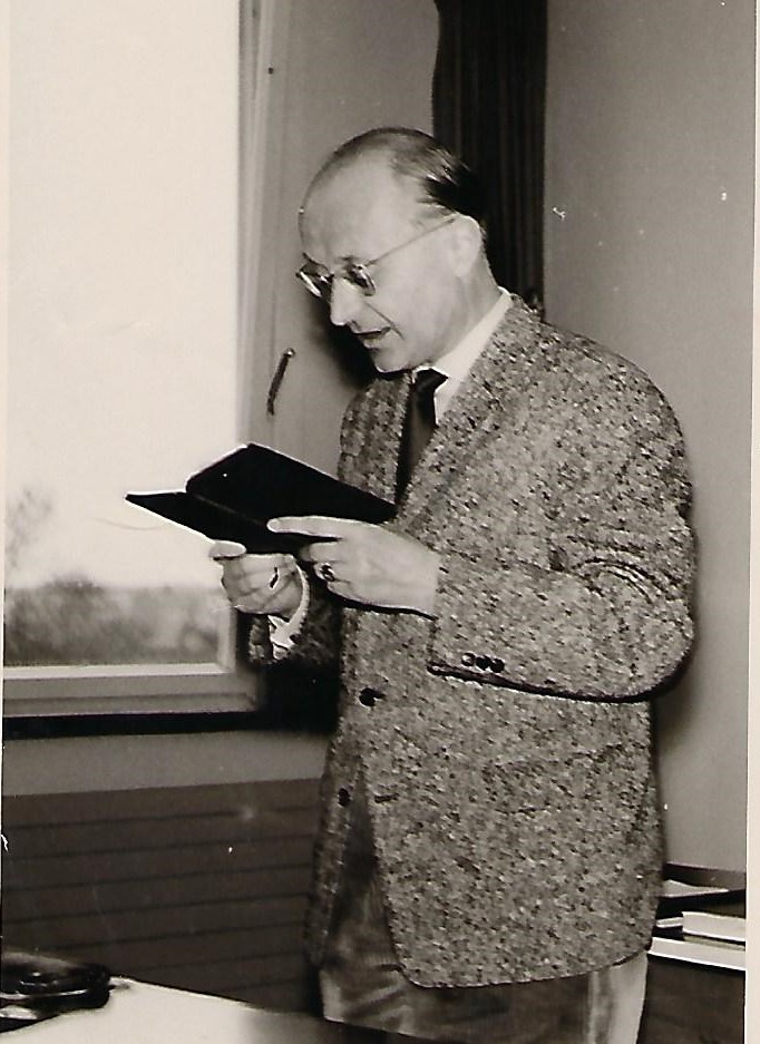 Oberstudienrat Dr. phil. Kurt Meyer beim Unterricht in der Wilhelm-Raabe-Schule (Bremerhaven)